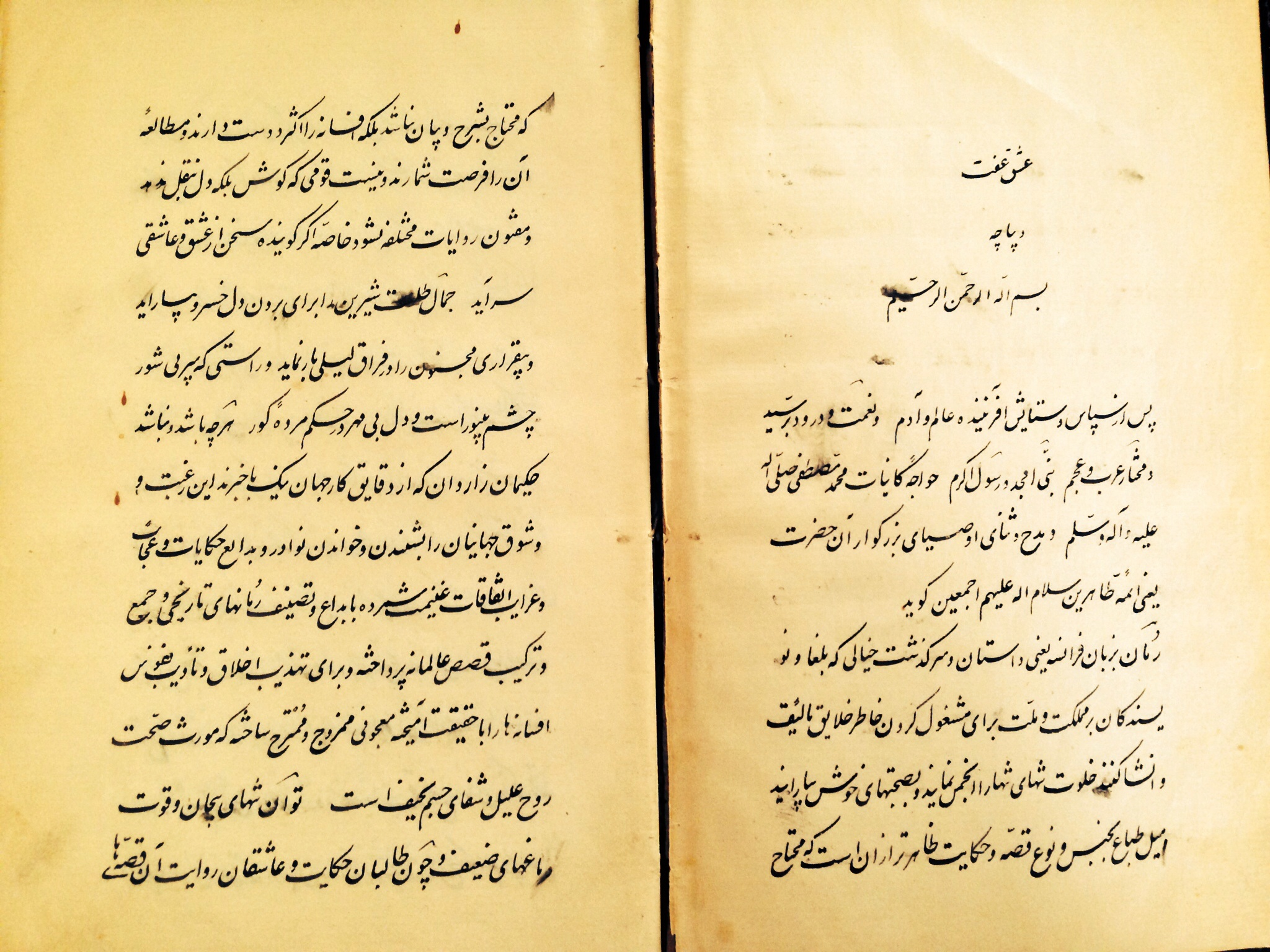 نسخه اصلي و دستنويس كتاب عشق و عفت نوشته شاتوبريان كه توسط ذكاالملك به فارسي ترجمه و بقلم ايشان و در راستاي دستور ناصرالدين شاه كتابت و به عبدالحسين خان ميرپنج فرمانده لشكر آذربايجان تقديم شده است.